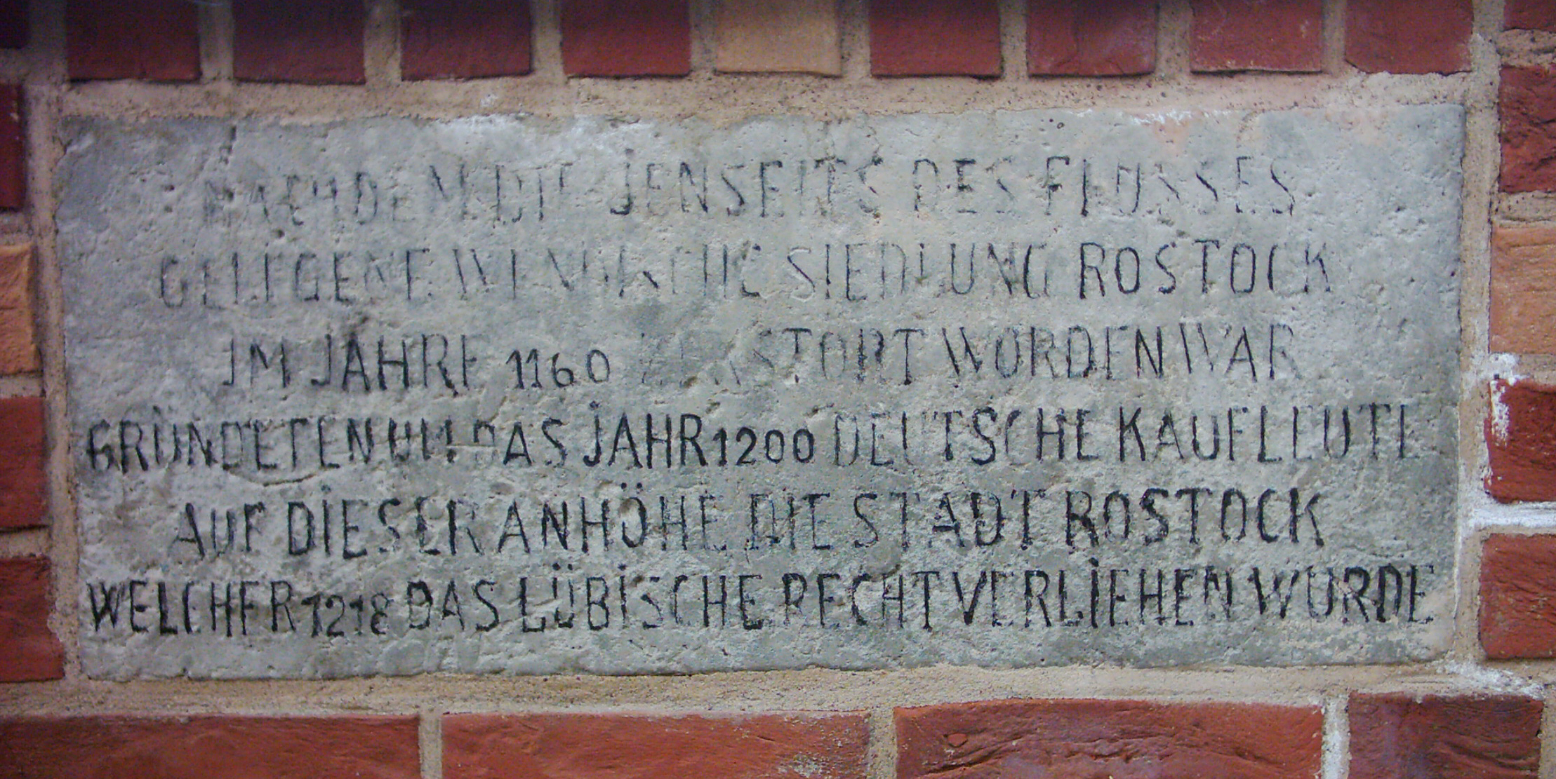 Mittelalterliche Stadtmauerinschrift zur Gründung der Stadt Rostock